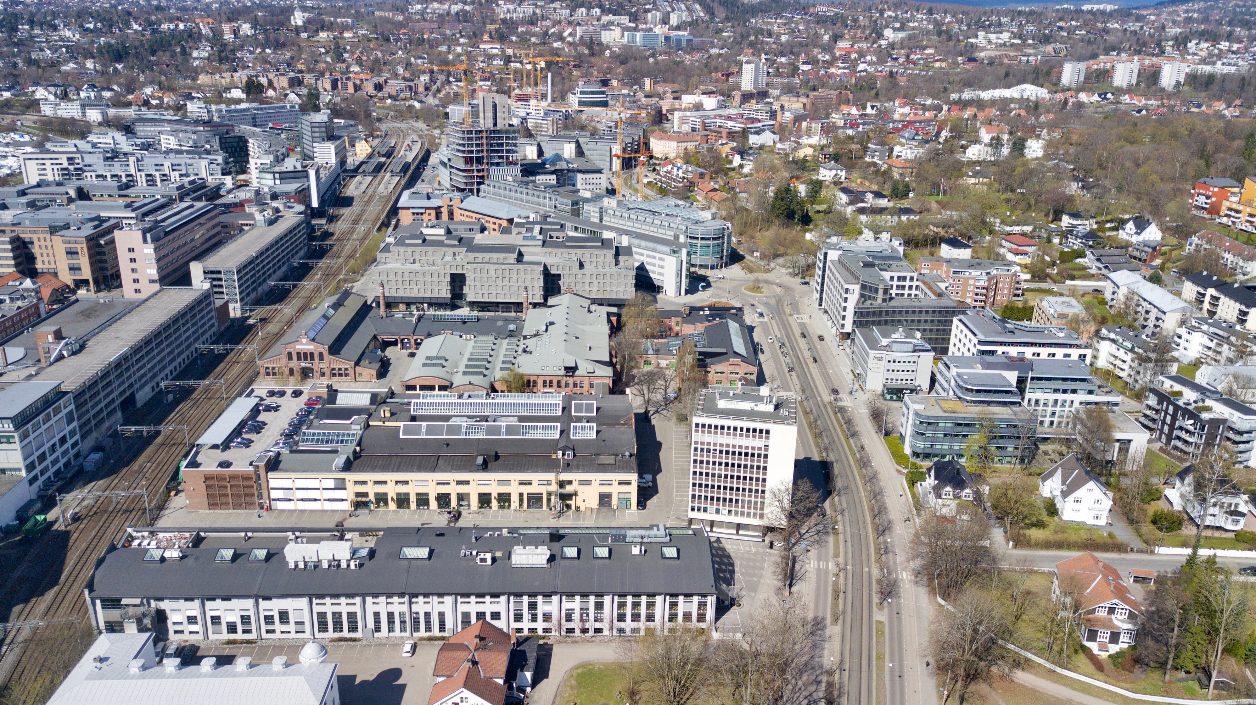 Thune, Skøyen. Oslo.